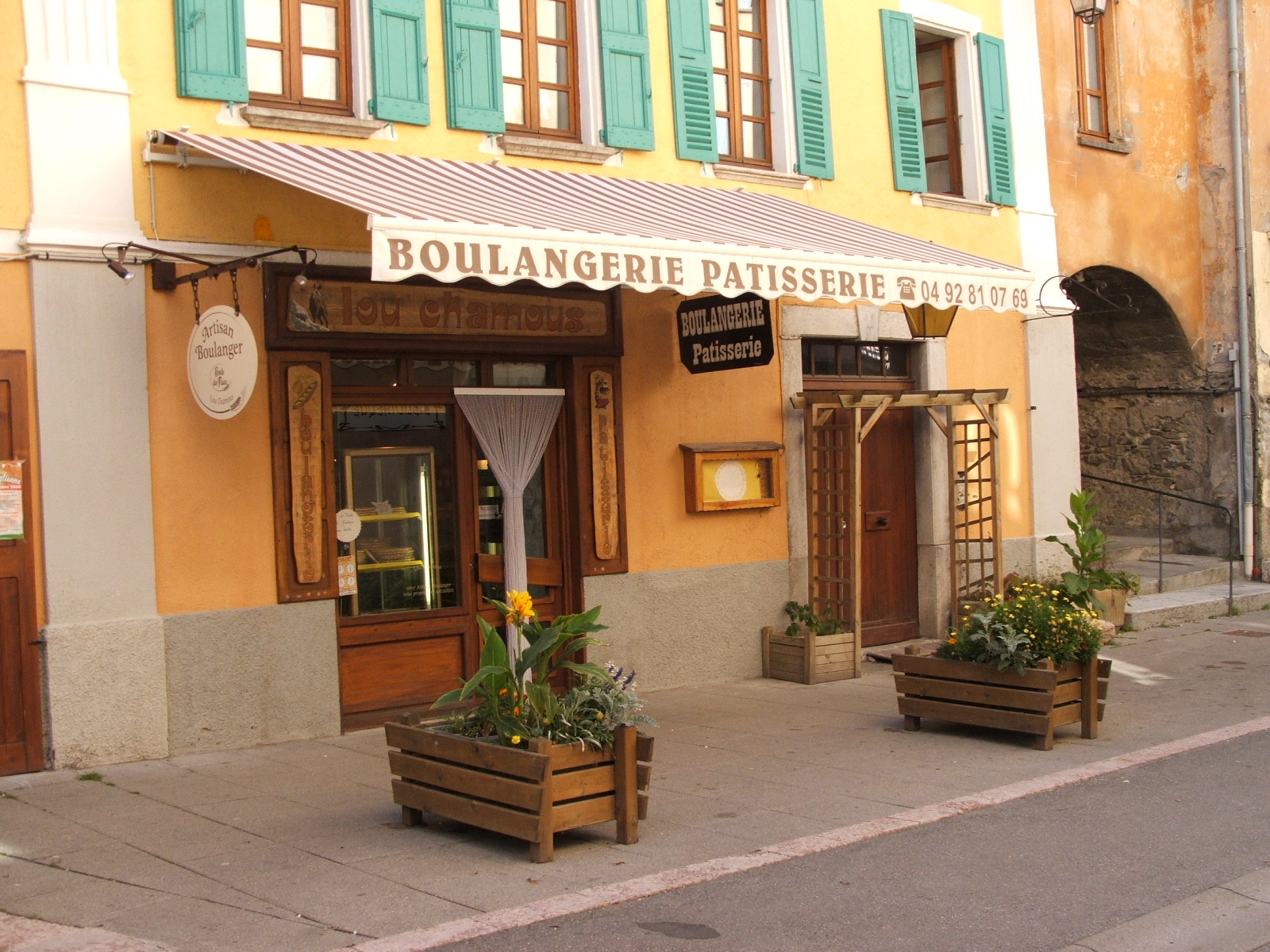 Jausiers, département des Alpes-de-Haute-Provence, France /3